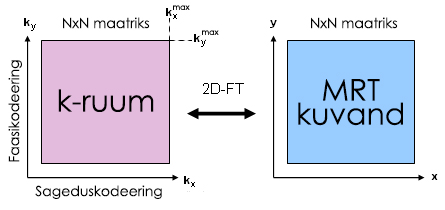 K-ruumist MRT kuvandi saamise skeem